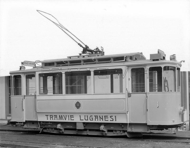 Werkaufnahme des Ce 2/2 1 der Strassenbahn Lugano